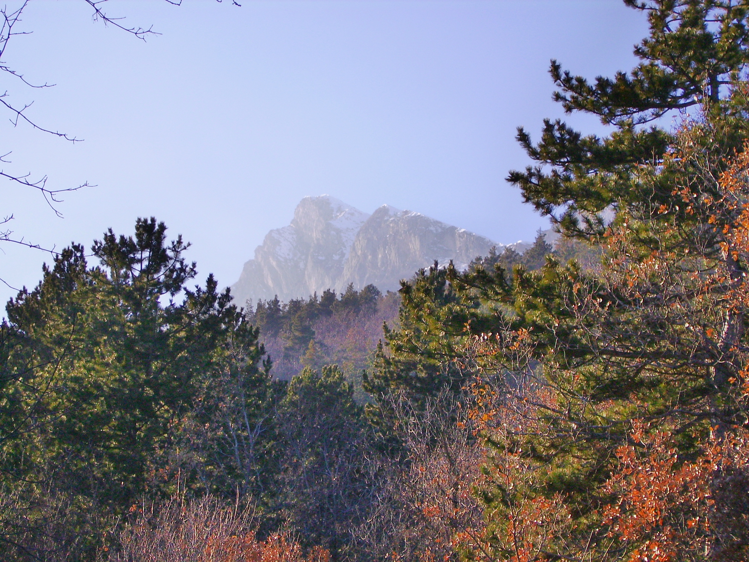 Vue hivernale du pic de Charance depuis le canal de Charance.